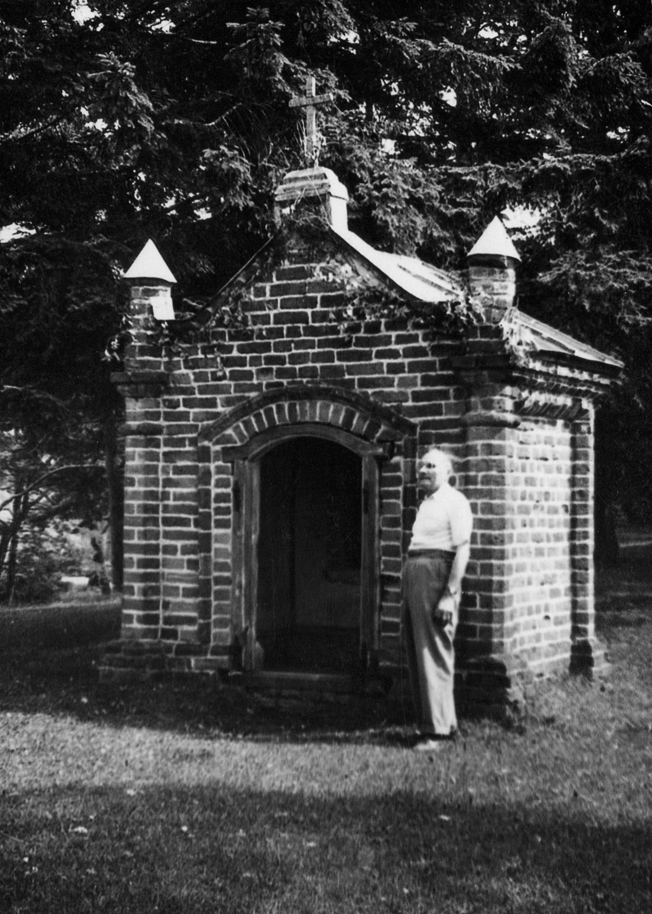 Veronikos koplytėlė Vepriuose